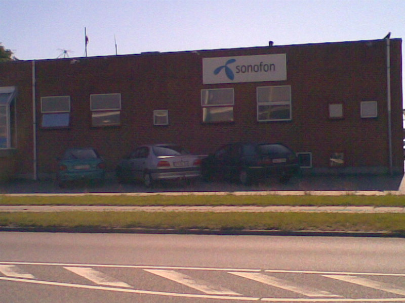 Sonofon-butik i Tilst.